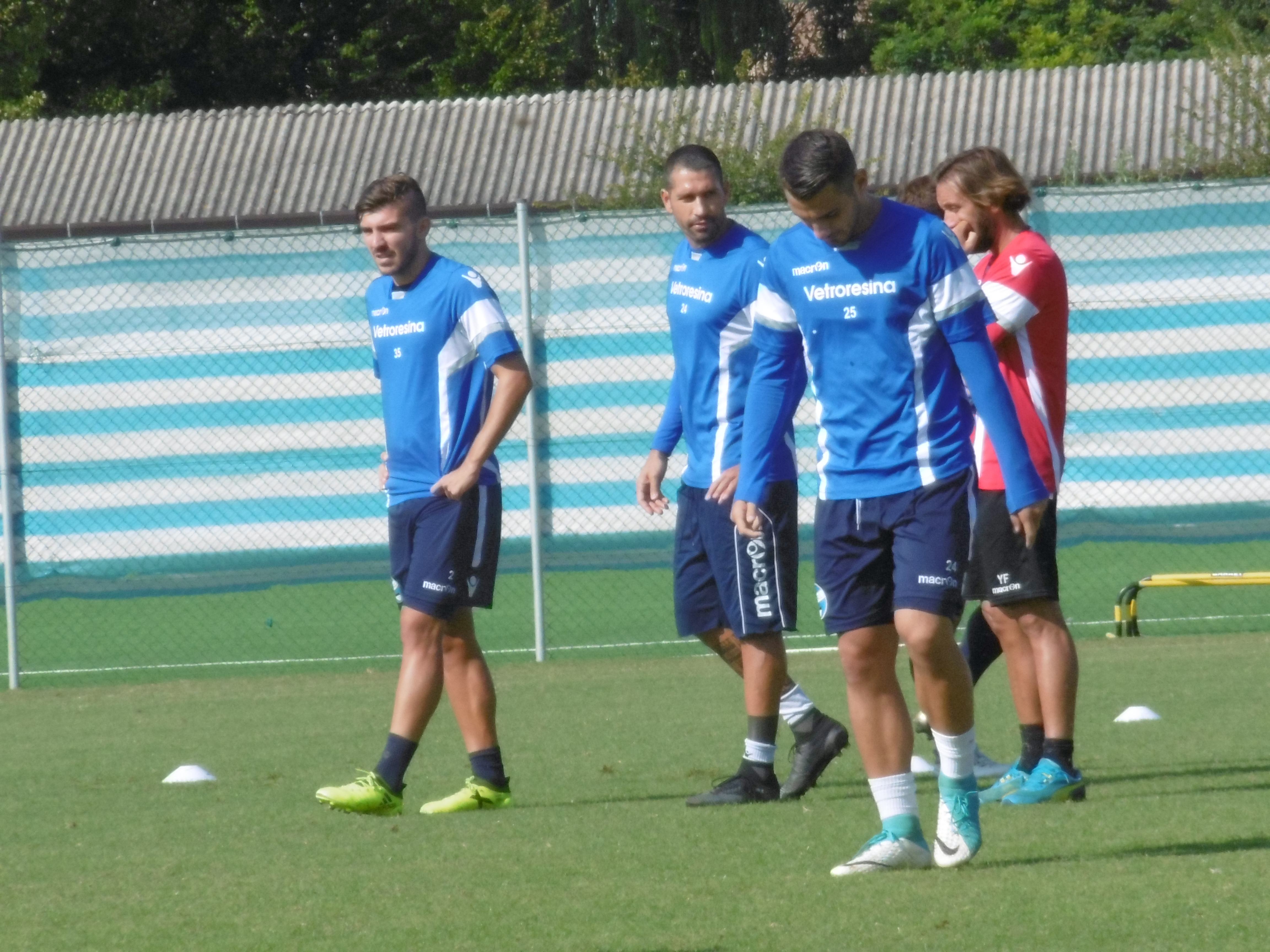 Alberto Paloschi e Marco Borriello